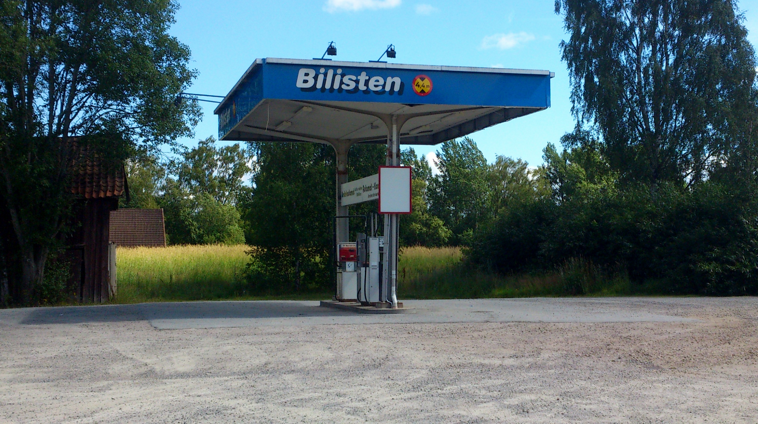 Bilisten-station i Gropen, Lekebergs kommun.